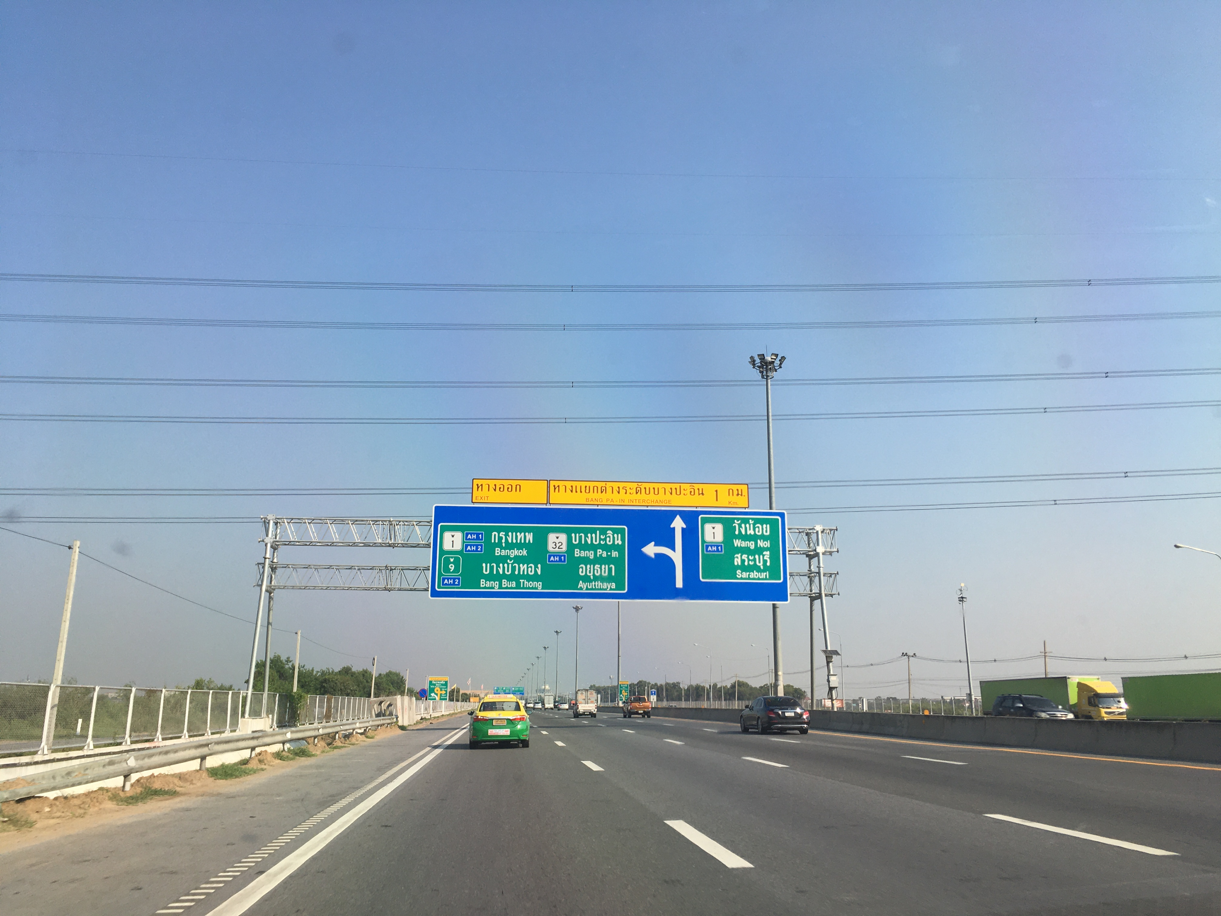 ทางแยกต่างระดับบางปะอิน 2